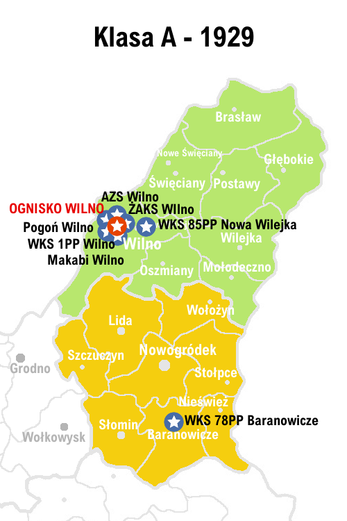 Rozgrywki w piłce nożnej w Wileńskim OZPN w 1929 roku